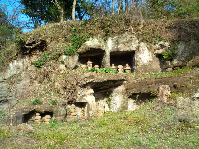 名越切通脇にあるまんだら堂やぐら群。